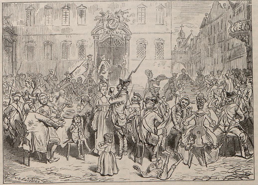 Kaffeekrieg oder Kaffelärm 1777